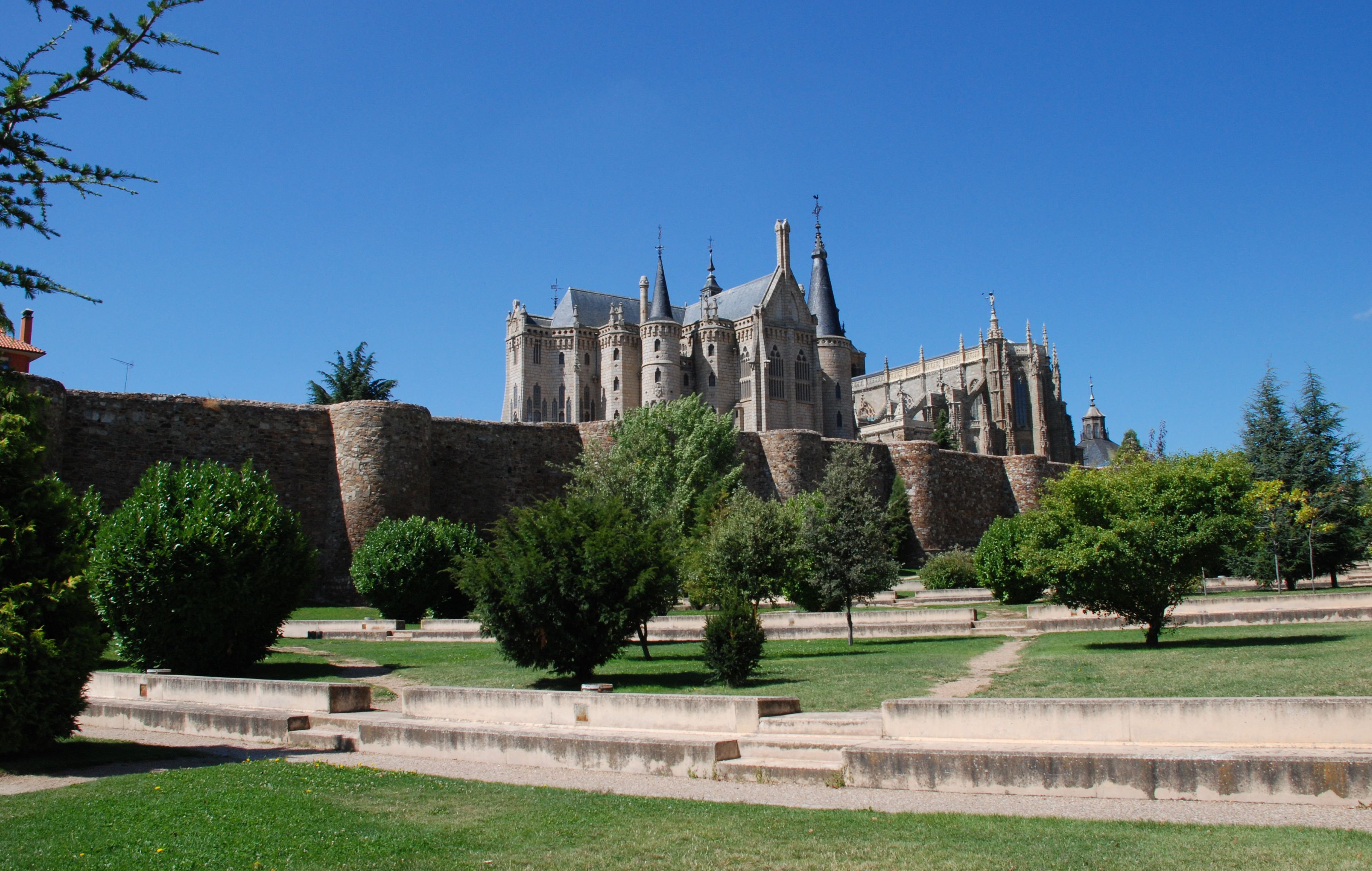 Muralla, Palacio Gaudí, Catedral de Astorga